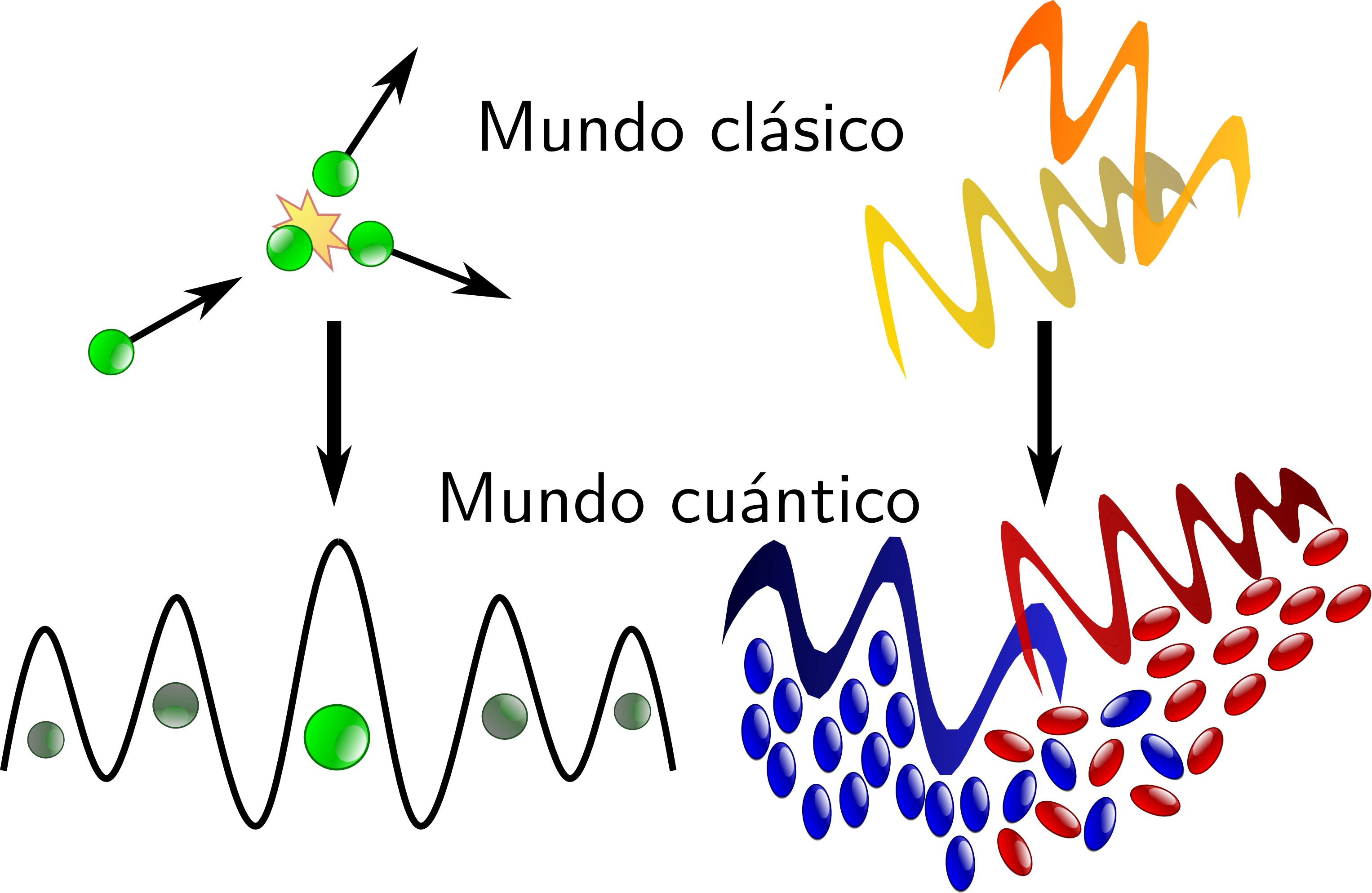 Classical and quantum fields and particles (spanish). Svg file also available. Una representación de campos y partículas, cuánticos y clásicos. El fichero .svg también está disponible.